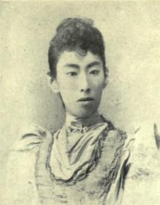 有栖川宮威仁親王妃慰子